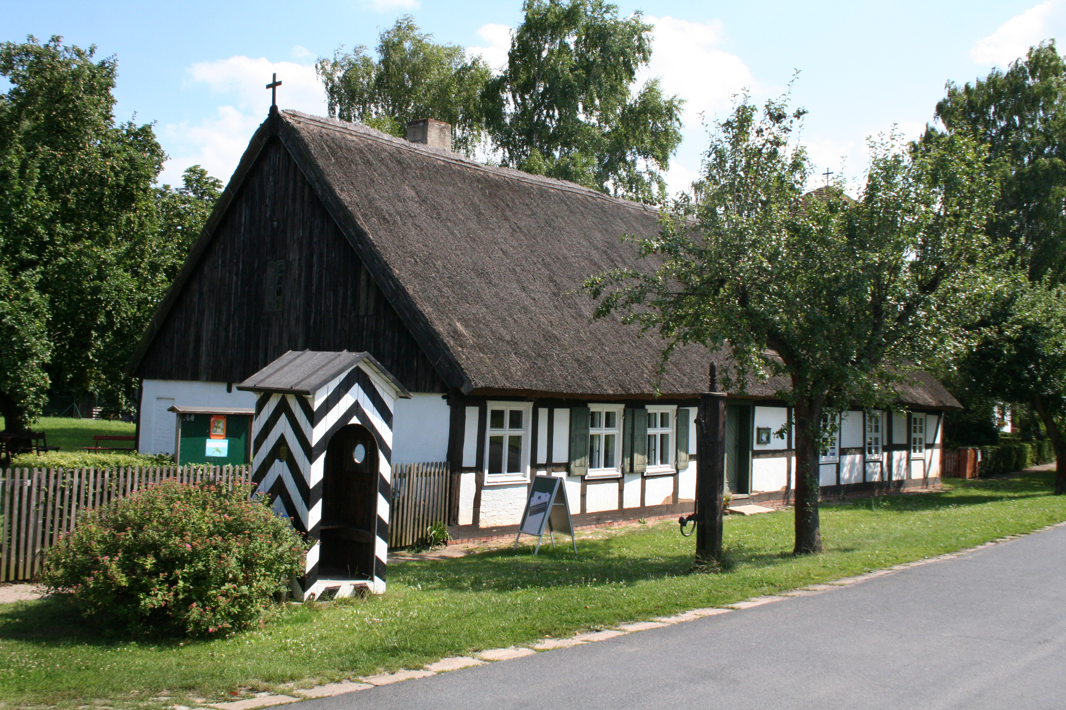 Das Schul- und Bethaus unter einem Dach wurde 1764 errichtet. Ein Glockenturm wurde im Jahre 1855 hinzugefügt. Gemeinde Neutrebbin, Brandenburg